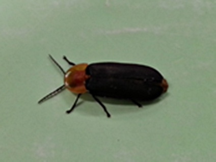 반딧불이